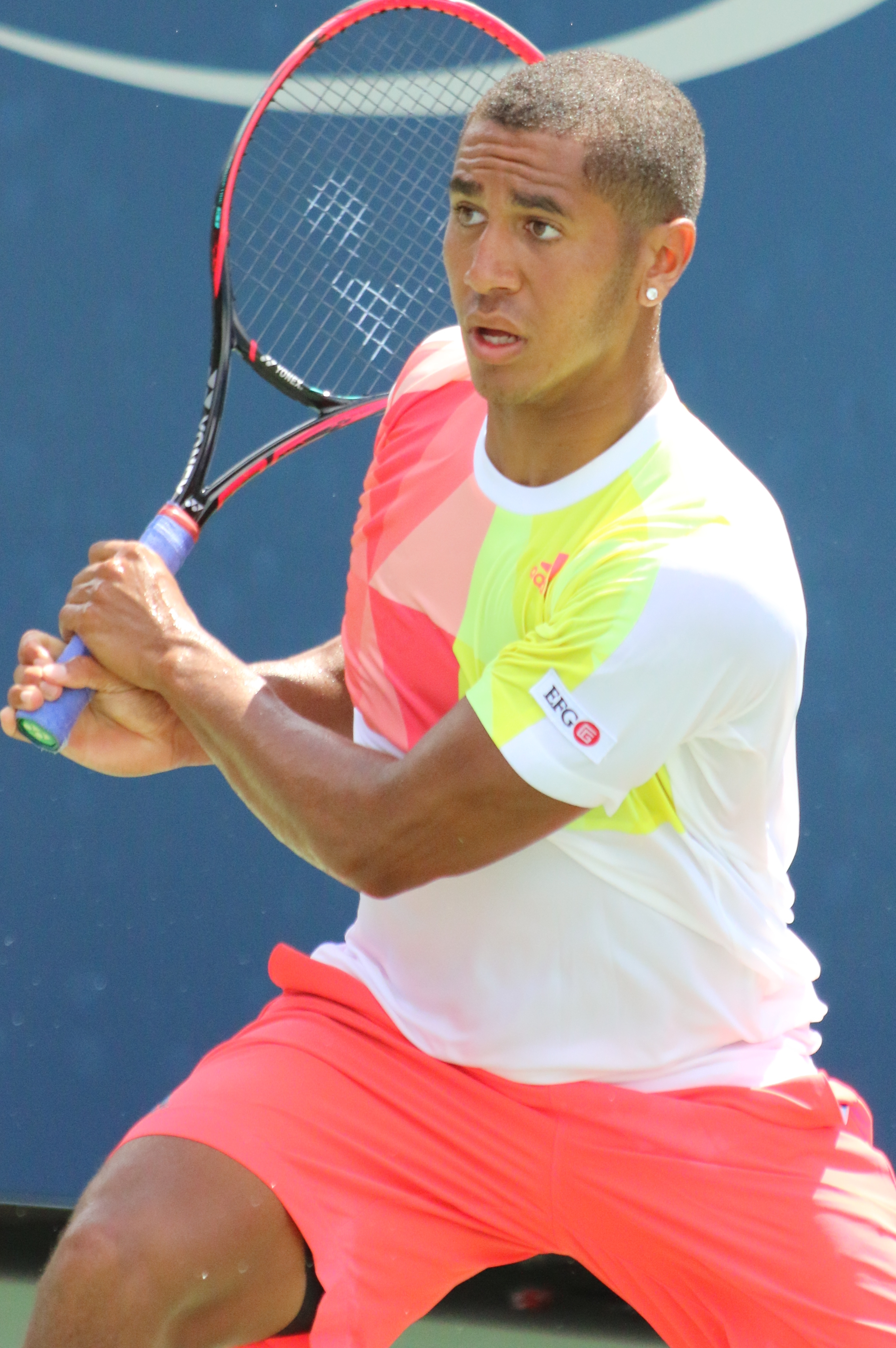 Mmoh US16 (10)